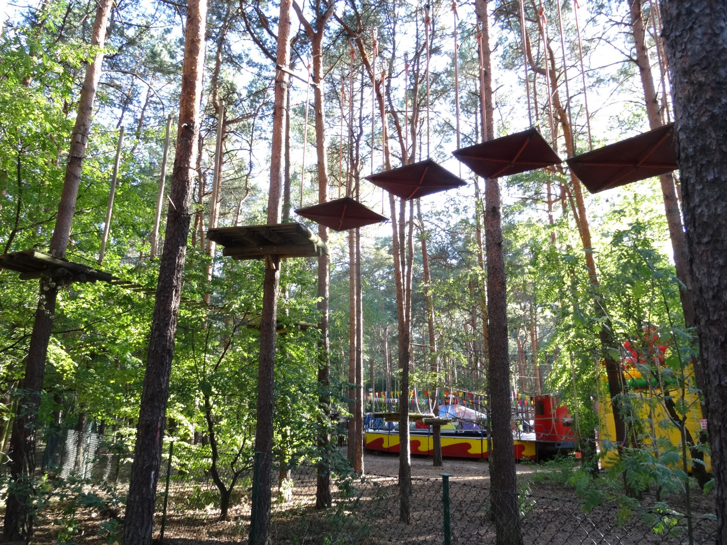 Park linowy w Leśnym Parku Kultury i Wypoczynku w Bydgoszczy